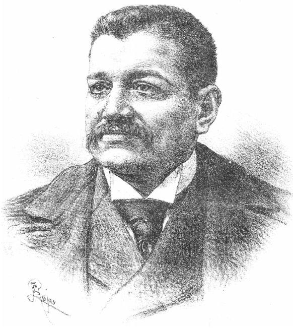 Manuel Ossa Ruiz, empresario y político liberal chileno. Nació en Freirina, el 24 de septiembre de 1854. Falleció en Viña del Mar, el 5 de septiembre de 1929. Hijo de José Santos Ossa Vega y doña Melchora Ruiz Correa. Casado con Blanca Sainte-Marie Echazarreta.